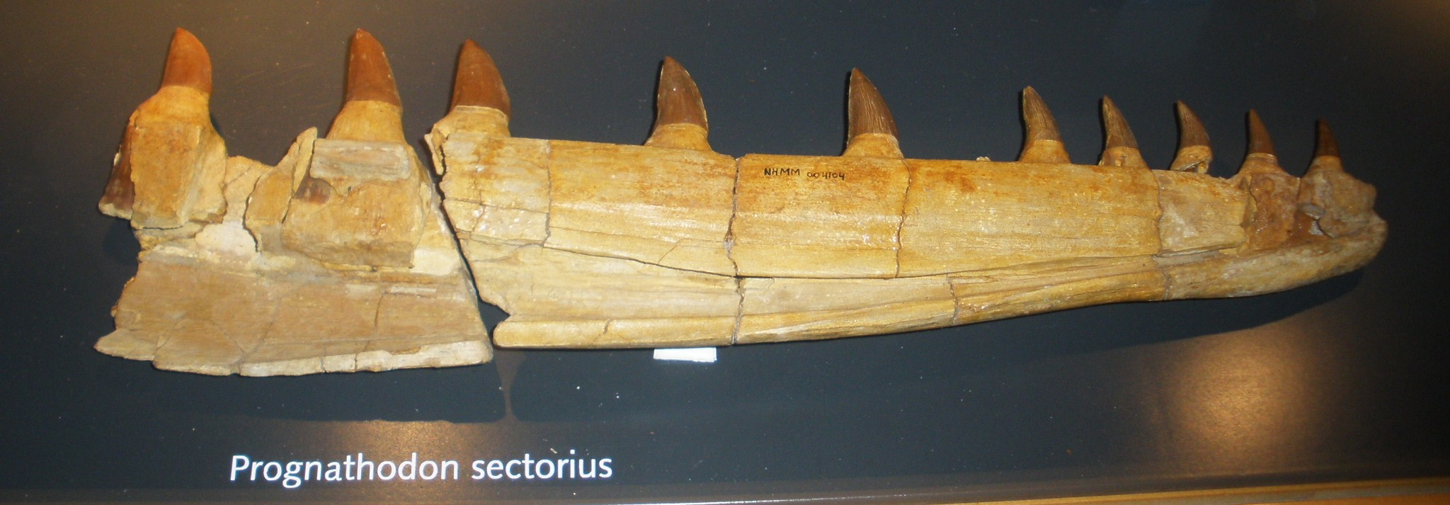 Fossil of Prognathodon, an extinct mosasaur- Took the photo at Natural History Museum of Maastricht